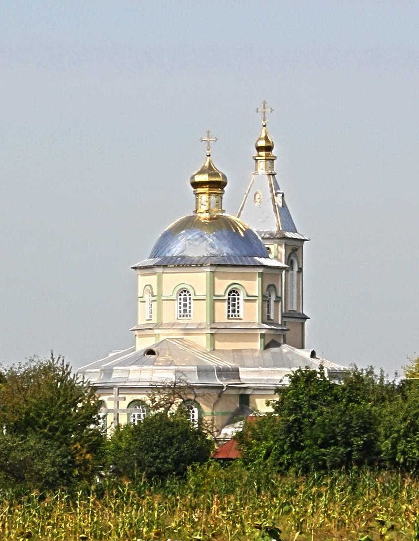 Янiвська церква